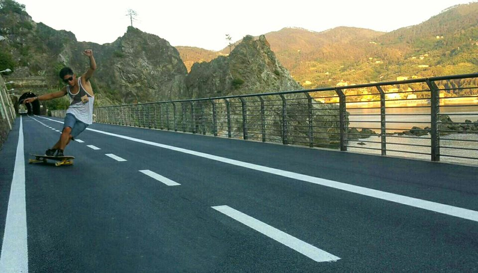 Skater durante un Peter Pan, Liguria.